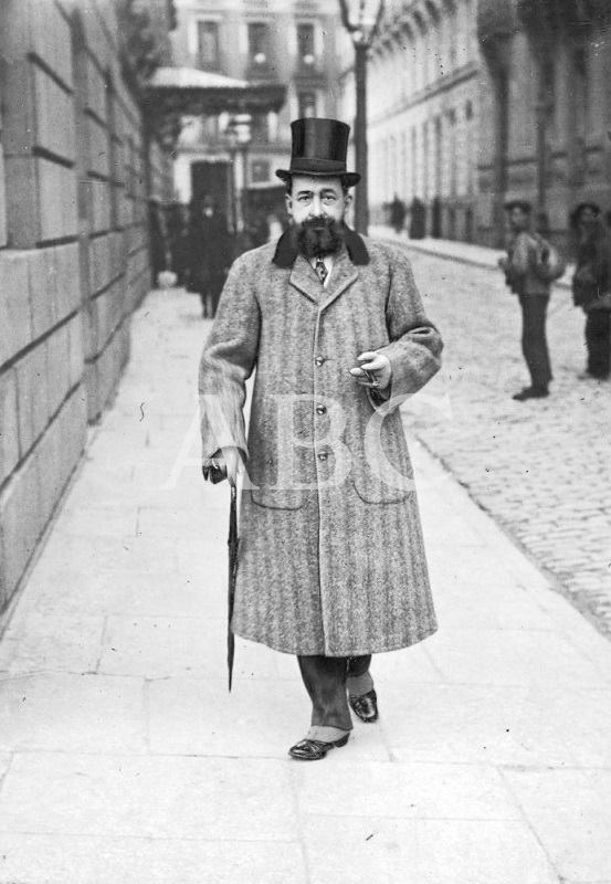 Rafael Díaz Aguado y Salaberry junto al Congreso de los diputados en 1912.